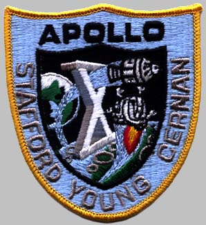 Emblem der Apollo 10 Mission